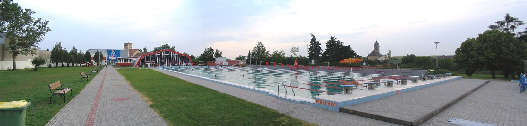 Gyöngyösi Strand